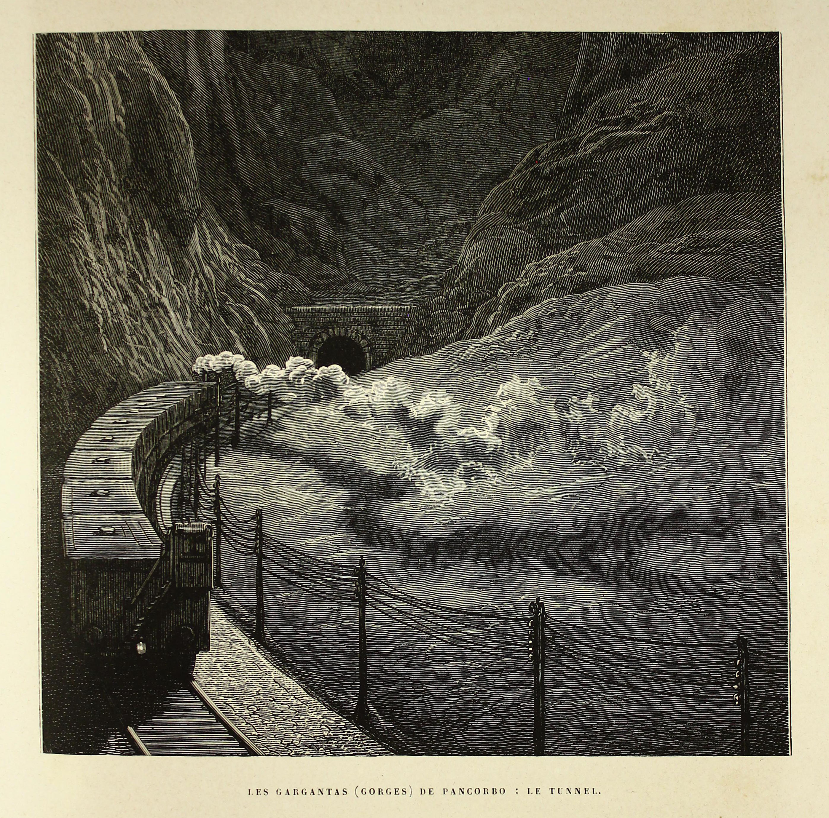 Autor: Davillier, Jean Charles, barón, 1823-1883 Descripción bibliográfica: L'Espagne / par Le Baron CH. Davillier ; ilustrée de 309 gravures dessinées su bois par Gustave Doré. - Paris : Librairie Hachette, 1874. - 799 p. : il. Materia: España- Geografía Materia: España- Usos y costumbres Ilustrador: Doré, Gustave, 1832-1883 Editor: Libreria Hachette Lugar de impresión: Francia, París Localización: Libro completo